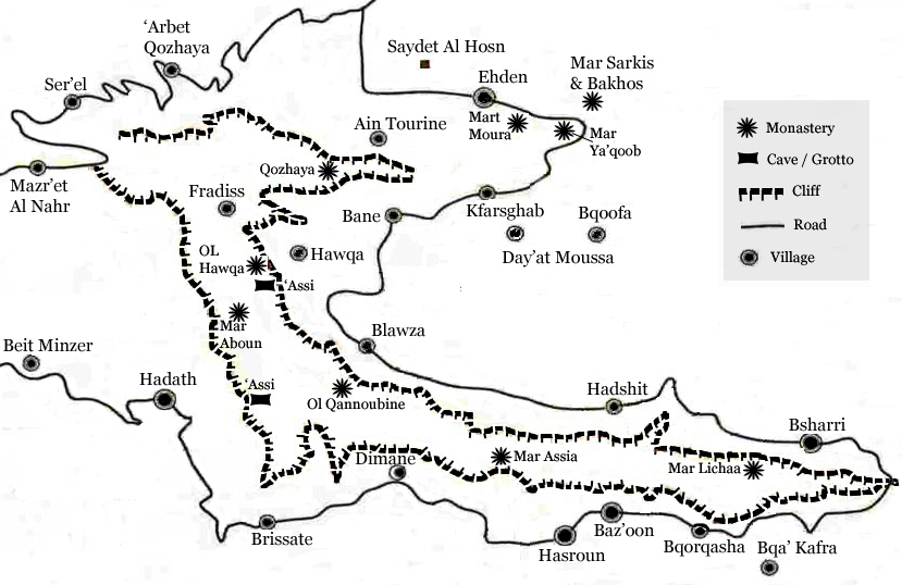 Carte de la Vallée de Qadisha, Liban dessinée par moi.Yellaban 15:09, 30 March 2007 (UTC)